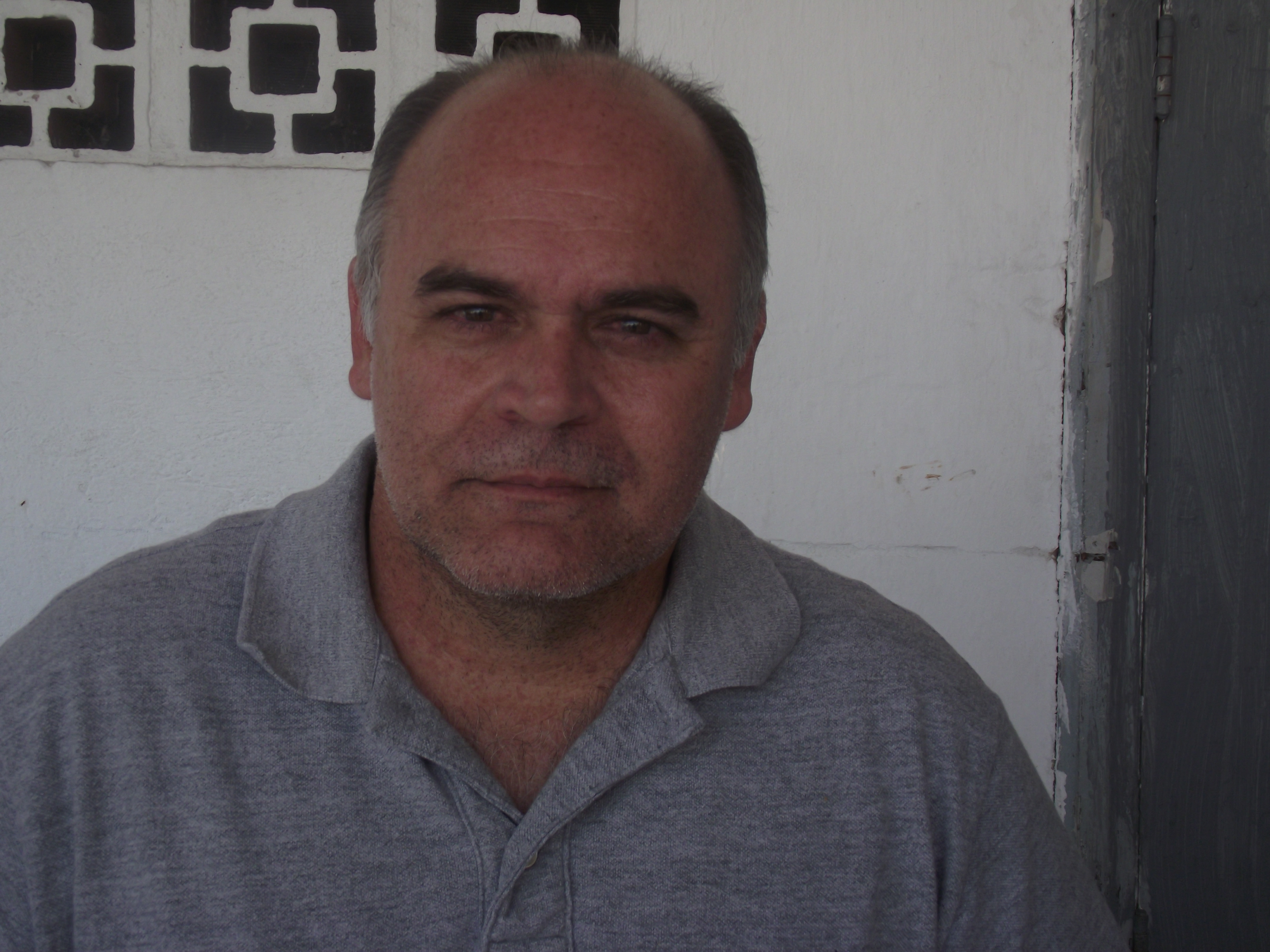 Maurício Assumpção, presidente do Botafogo em 2012.